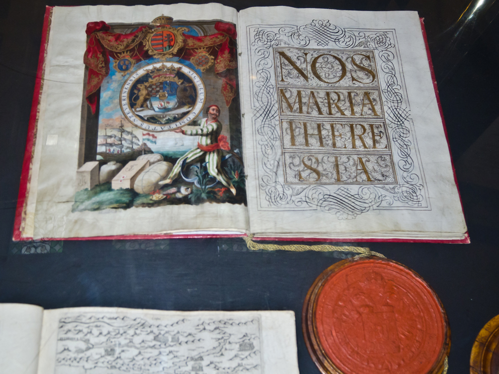 Hrvatski državni arhiv